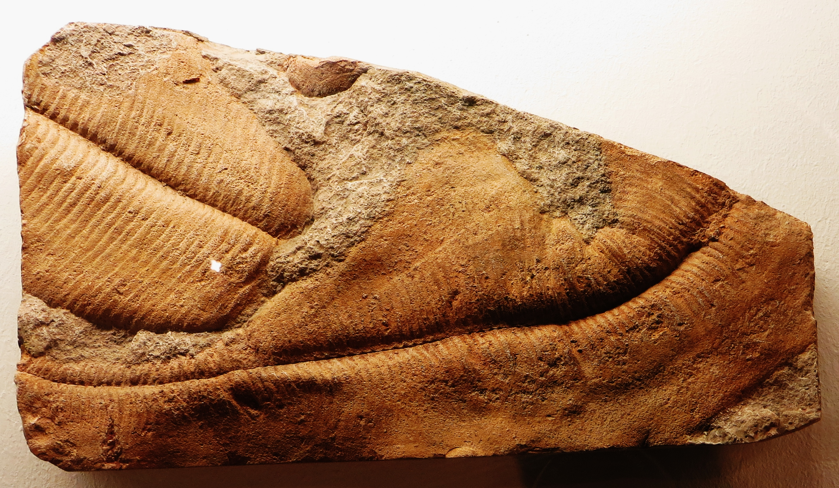 Fossil of Pteridinium, an ancient being- Took the picture at Museum of Paleontology of Tuebingen